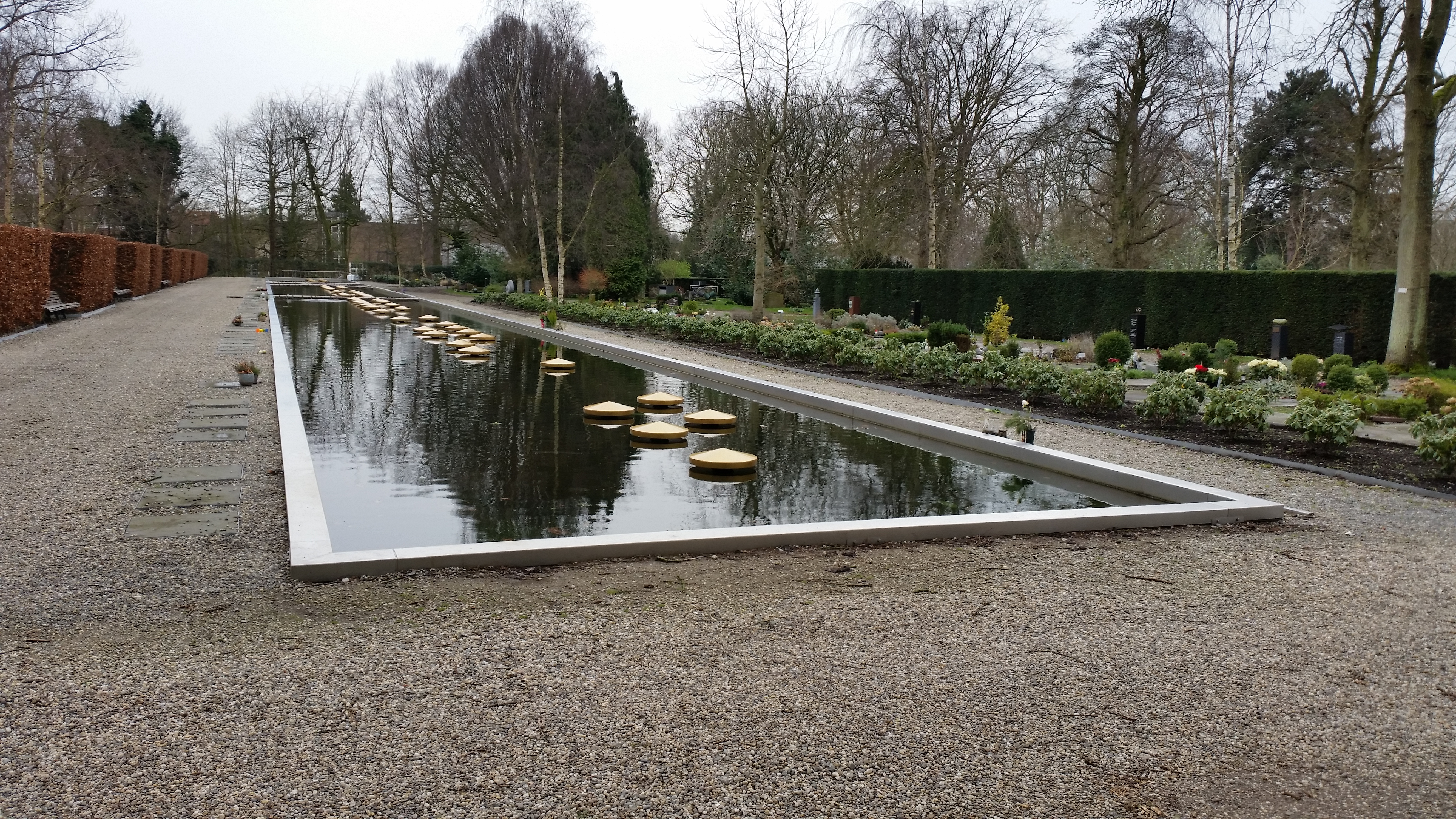 Van 2005 tot 2009 werd naar ontwerp van Karres en Brandsma landschapsarchitecten een nieuwe urnentuin met vijver aangelegd aan de achterzijde van de begraafplaats.